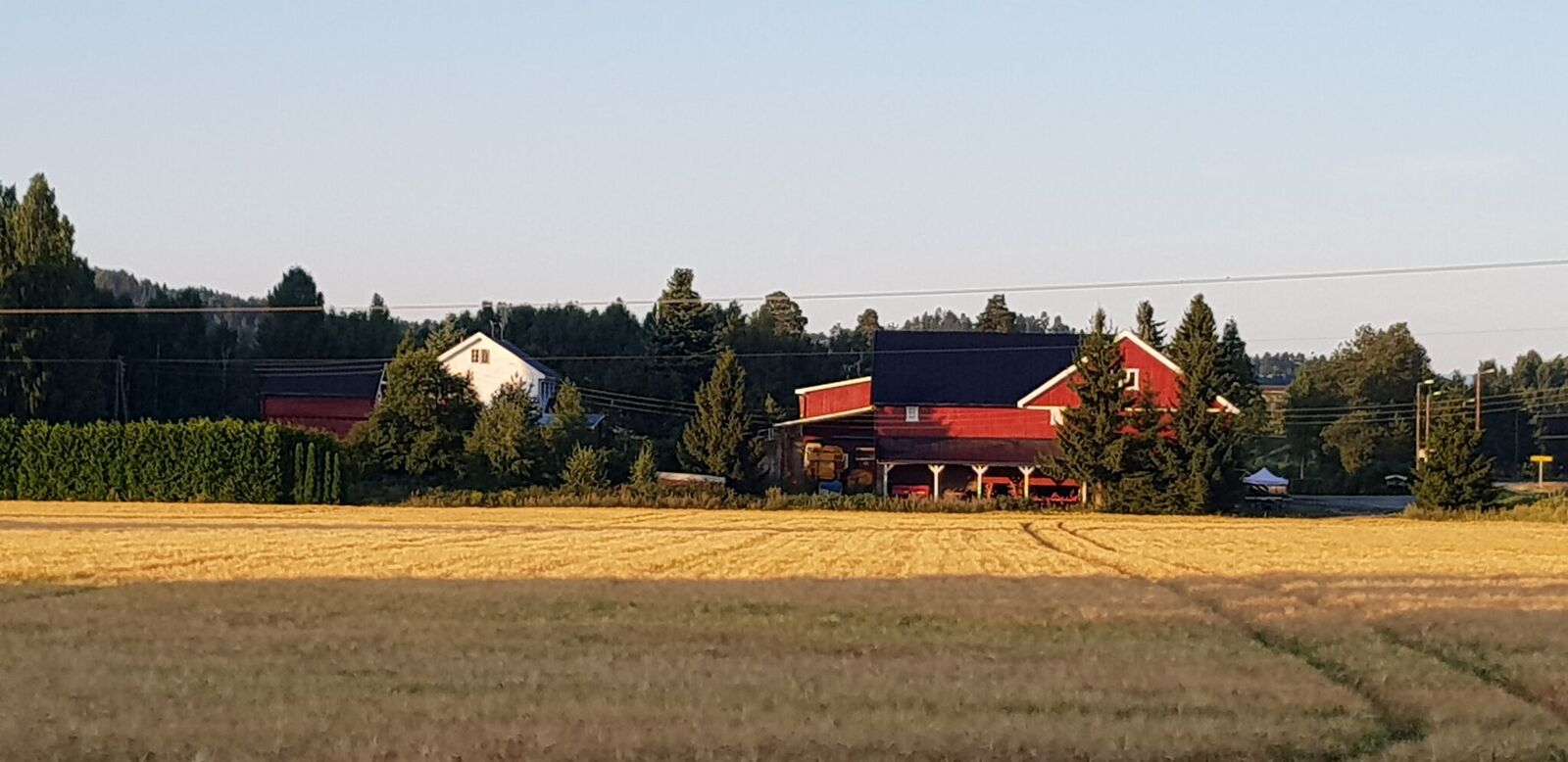 Sett nordfra.